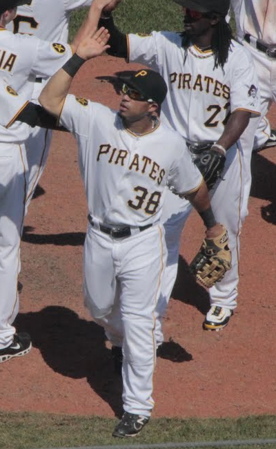 Xavier Paul